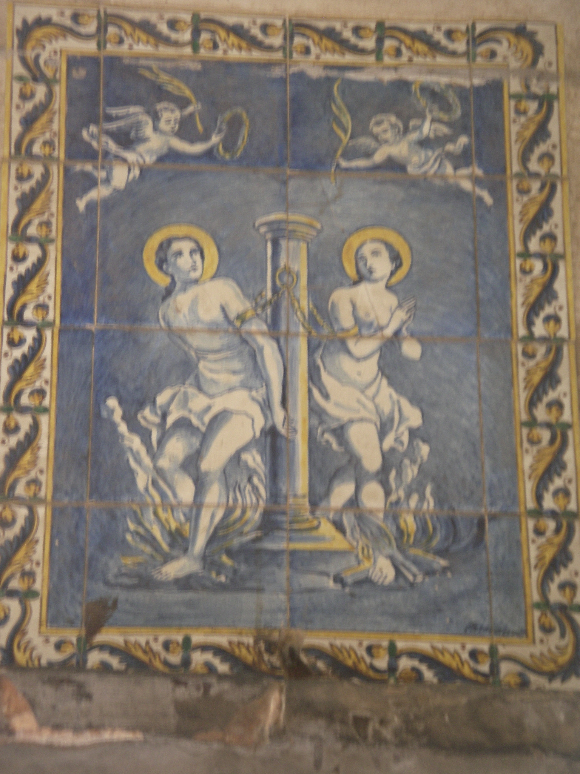 Sants Llucià i Marcià, plafó ceràmica a la Plaça Major de Vic.